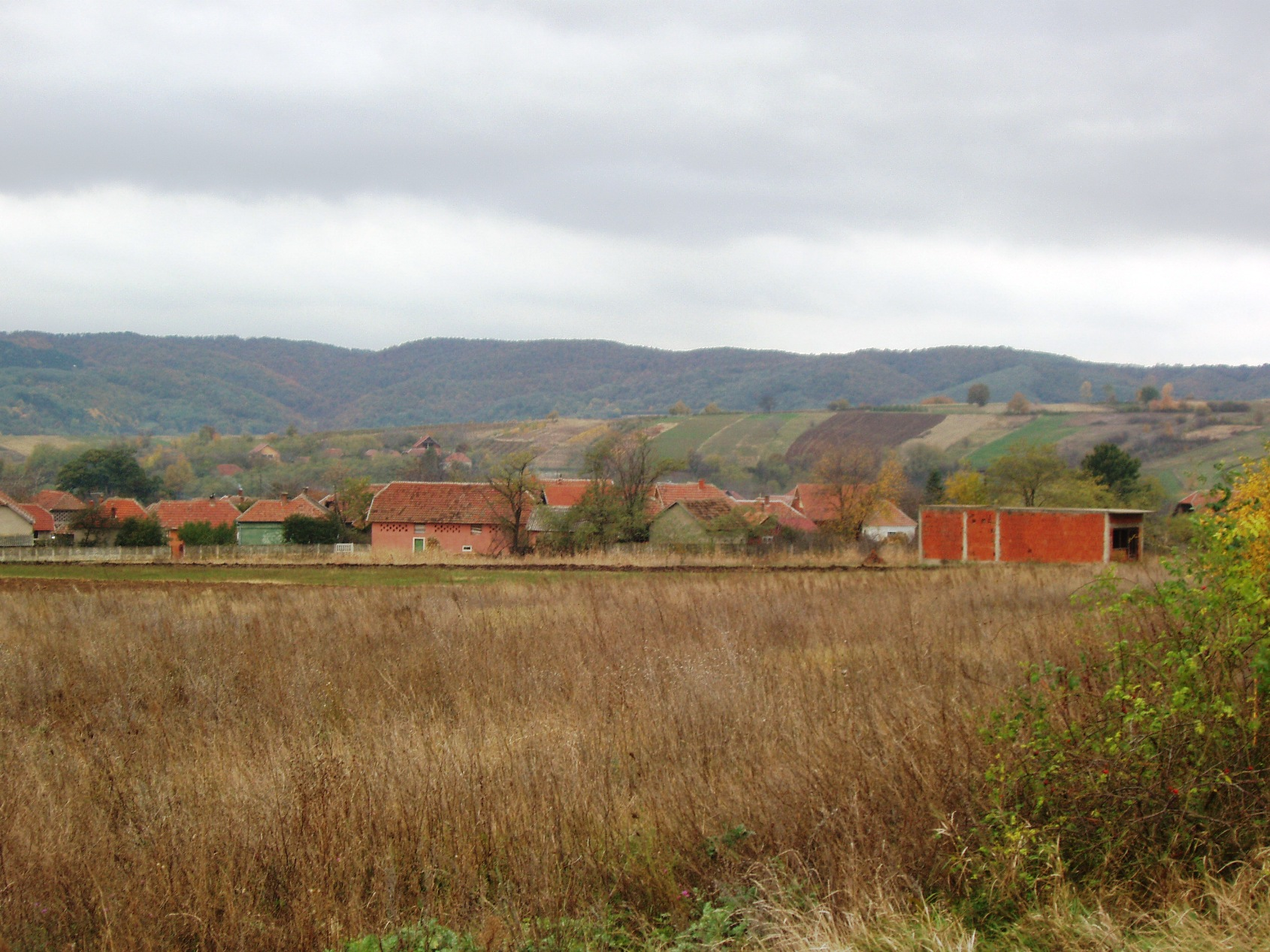 Липовац (Ражањ)